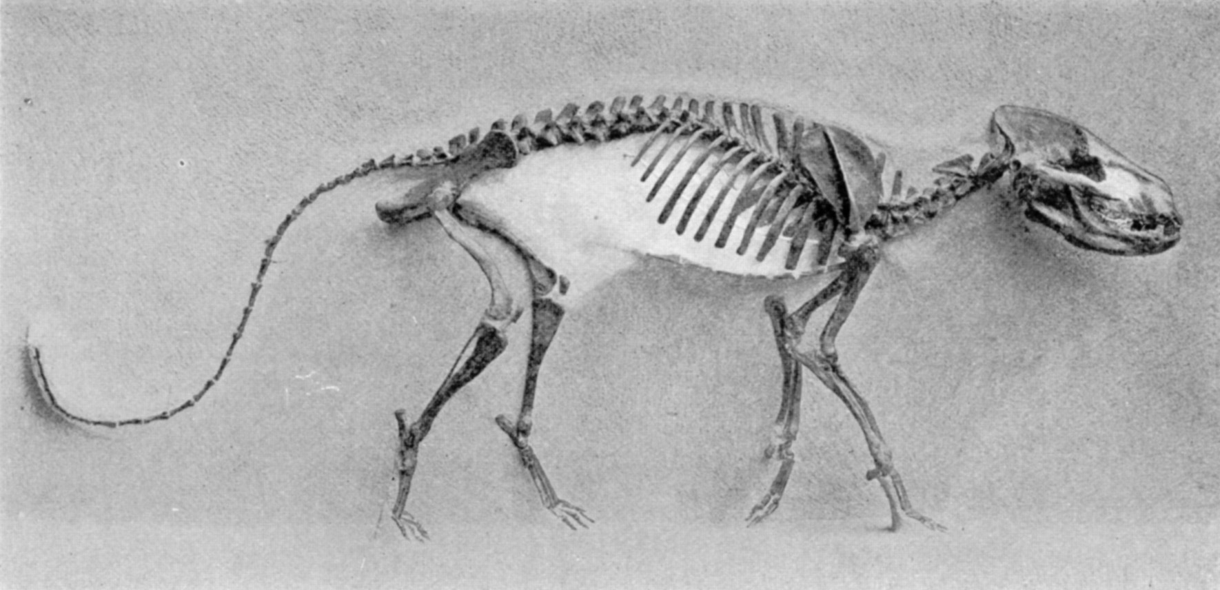 Synoplotherium skeleton, Yale.